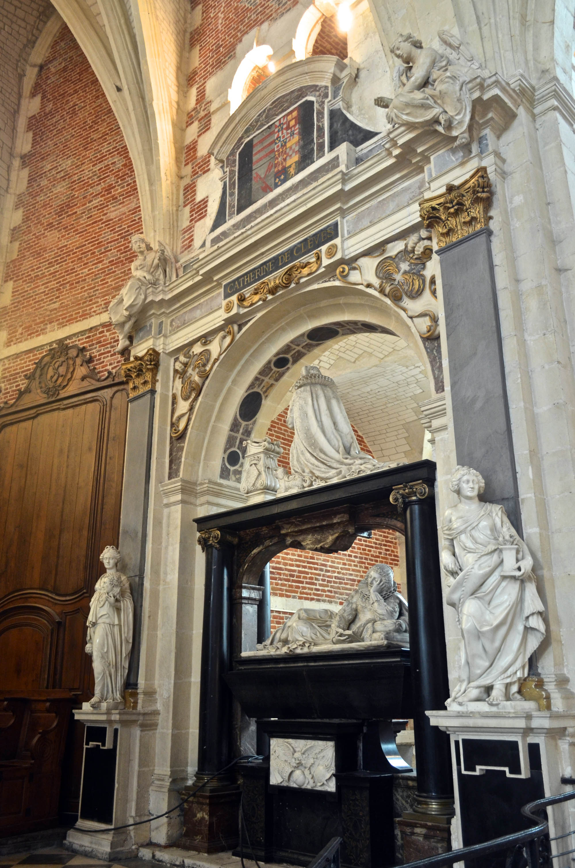 Chapelle du collège des Jésuites d'Eu (Seine-Maritime, France), mausolée de Catherine de Clèves.